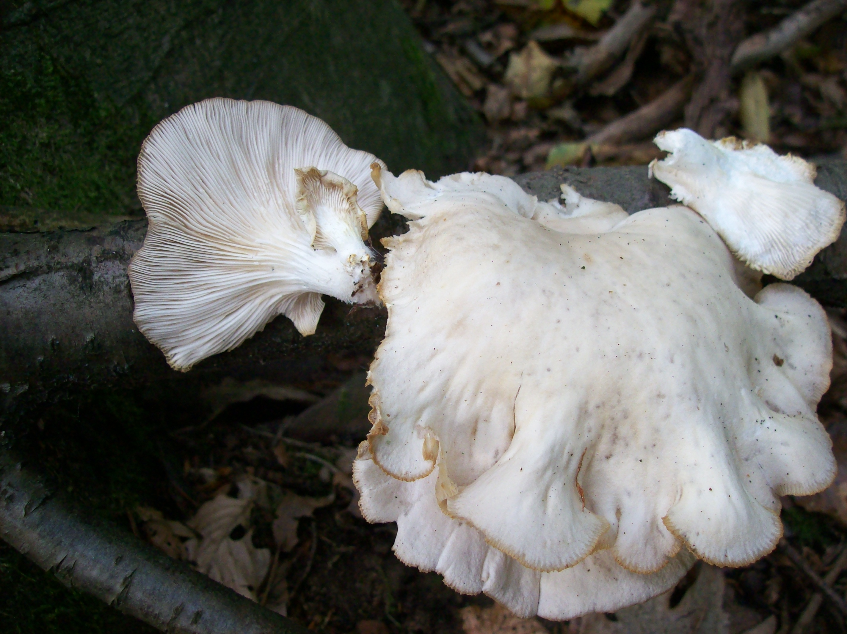 Austern-Seitling (Pleurotus ostreatus), Sommerform (mikroskopisch bestimmt).